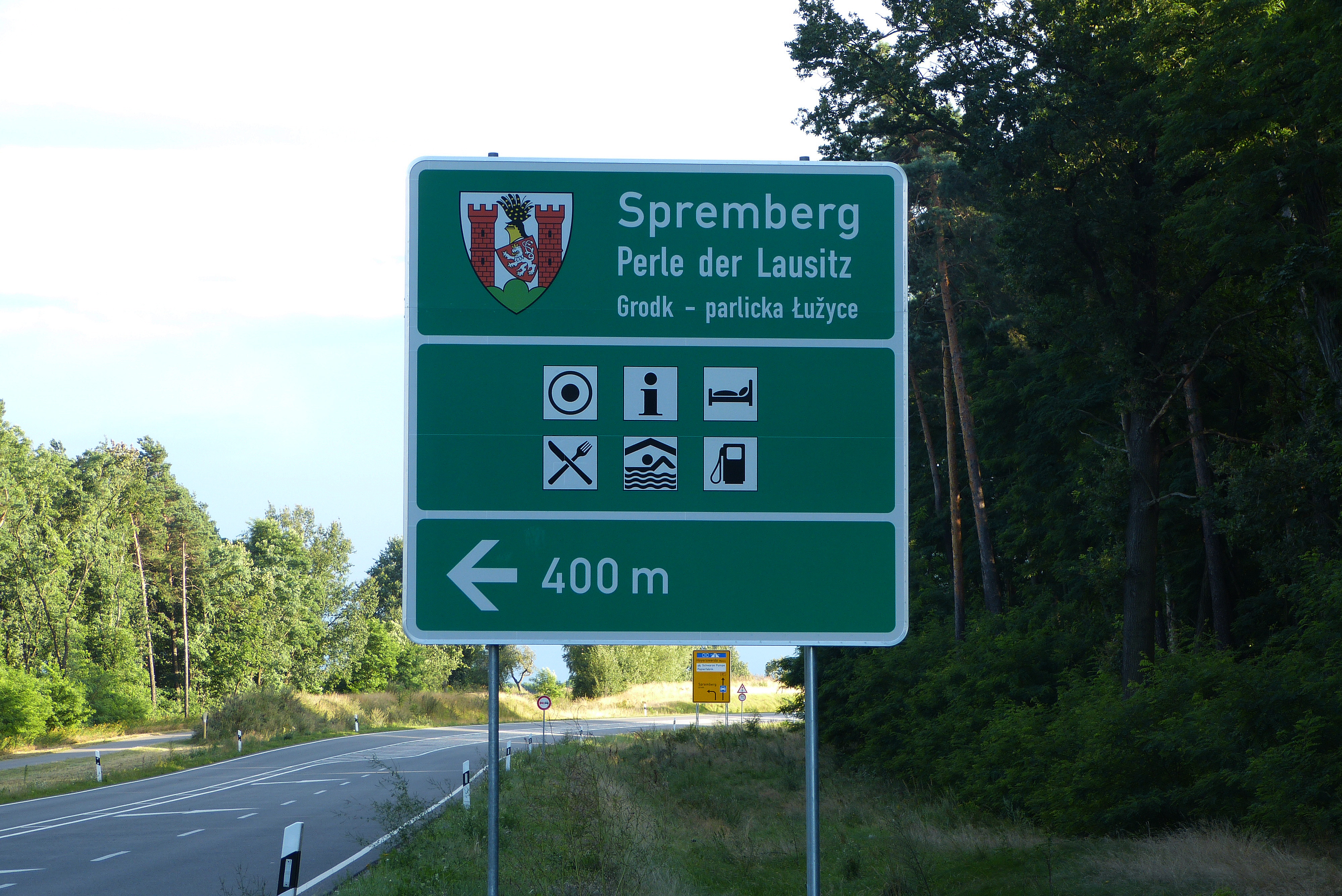 zweisprachiges Hinweisschild „Spremberg - Perle der Lausitz“ an der Bundesstraße 97 etwa 1 km vor dem Ortseingang Spremberg aus Richtung Norden kommend.